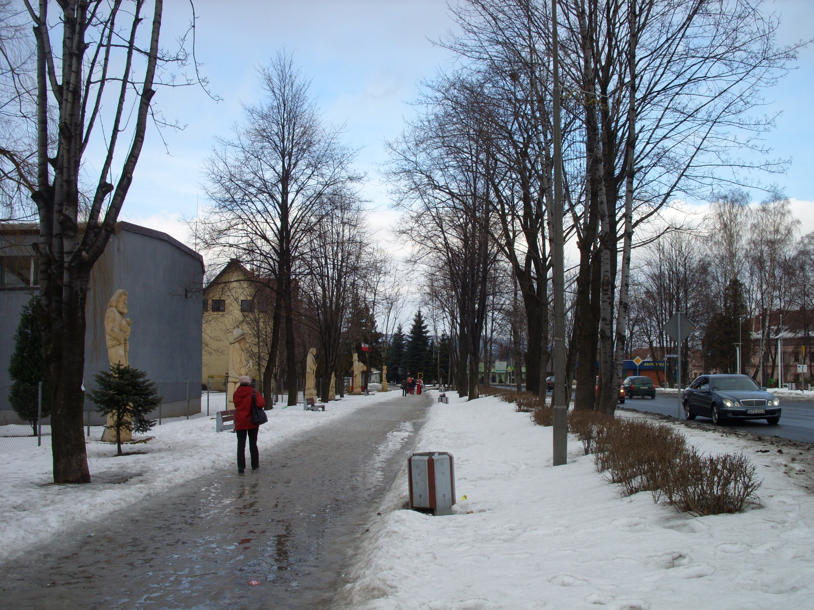 Aleja Zbójników w Węgierskiej Górce